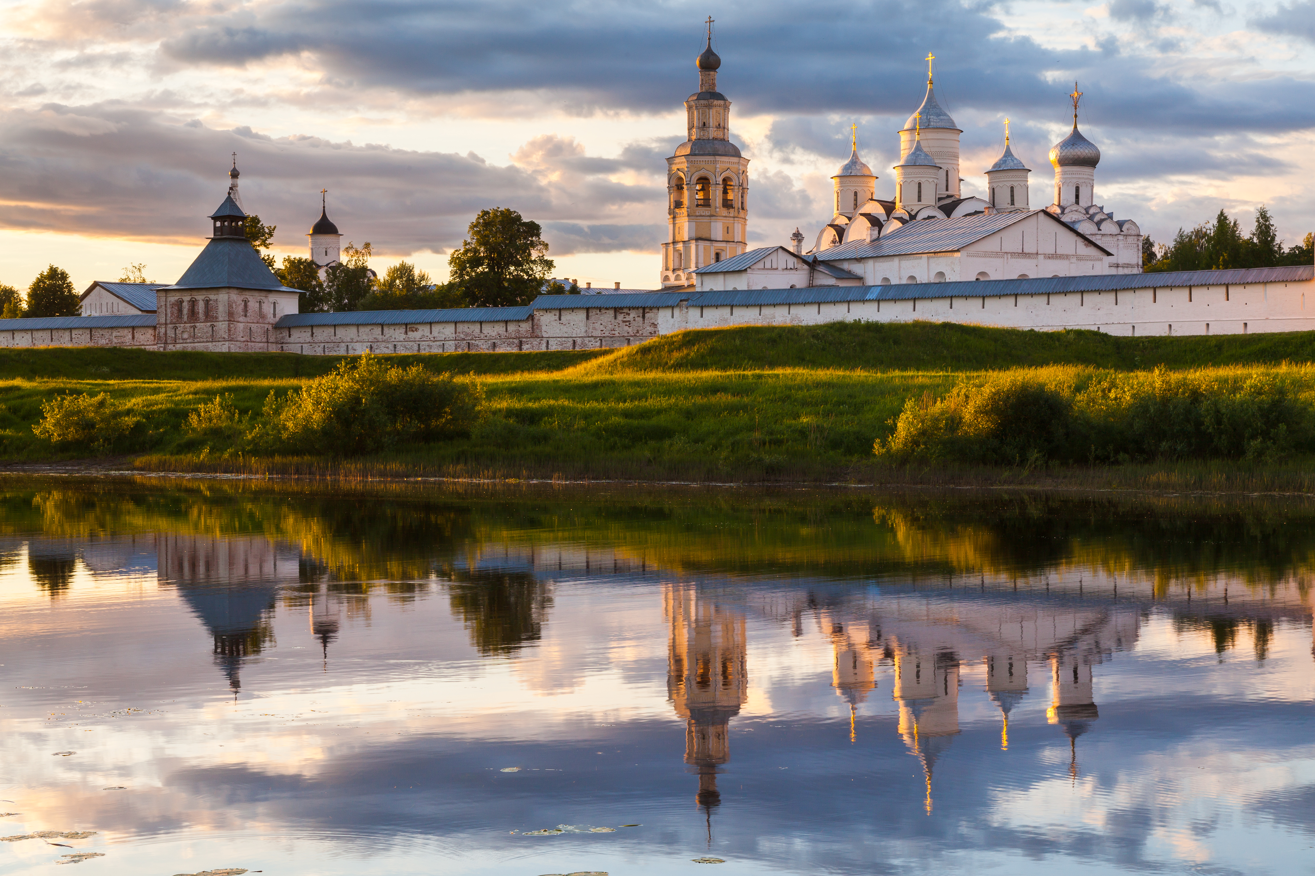 Ансамбль Спасо-Прилукского монастыря (филиал музея-заповедника): Прилуки, Вологодский район, Вологодская область